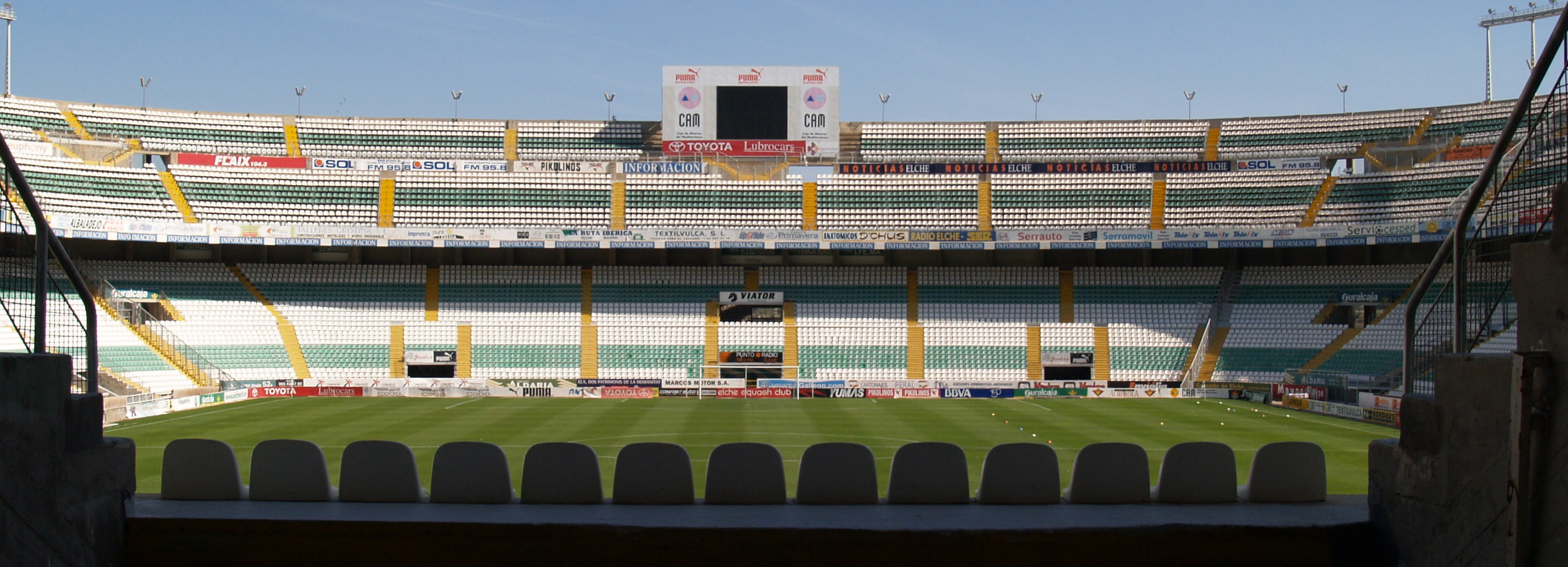 Foto realizada en un partido matinal del Elche Ilicitano.